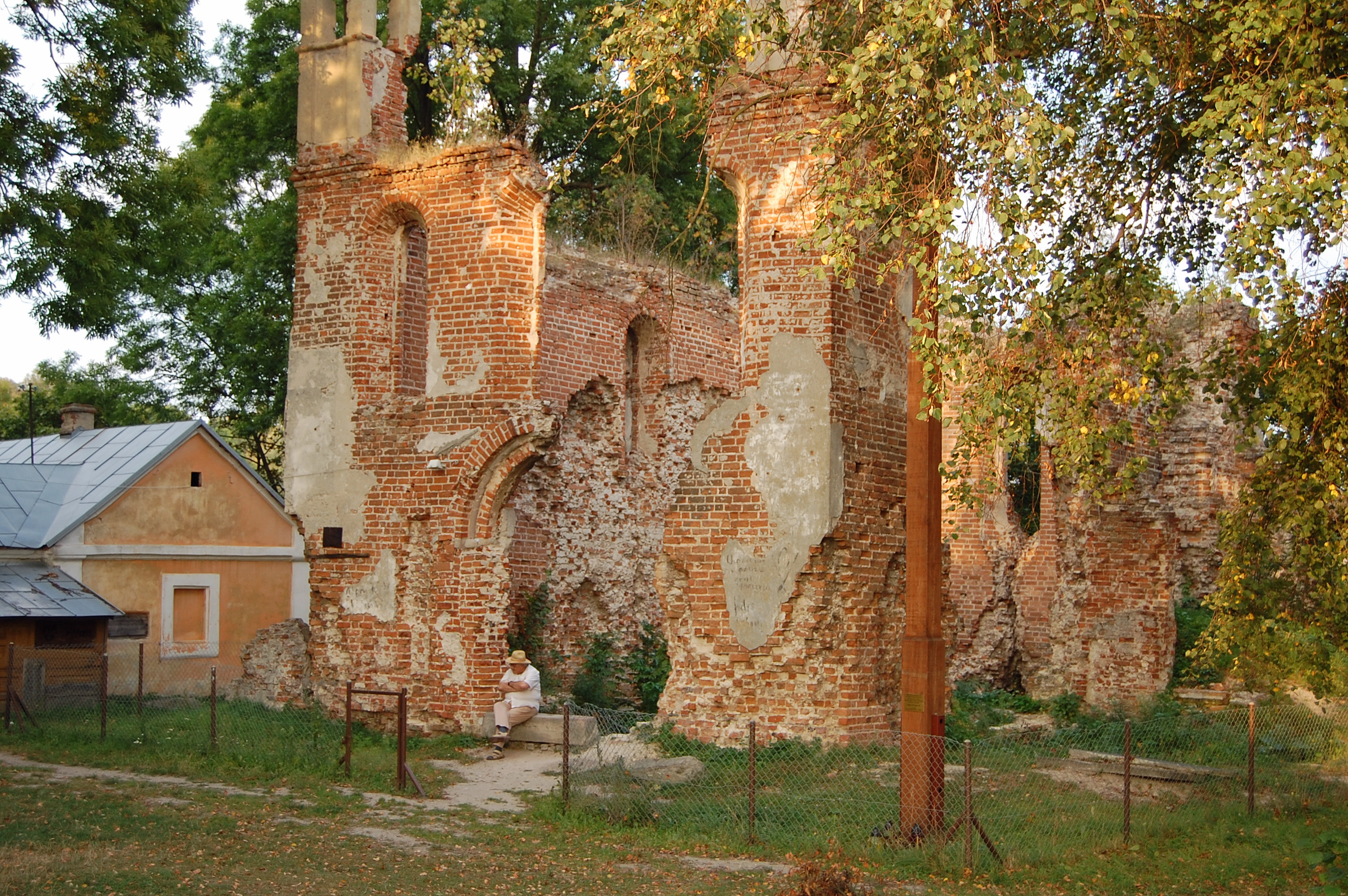 Ruiny katolickiego kościoła parafialnego pw. Trójcy Św.